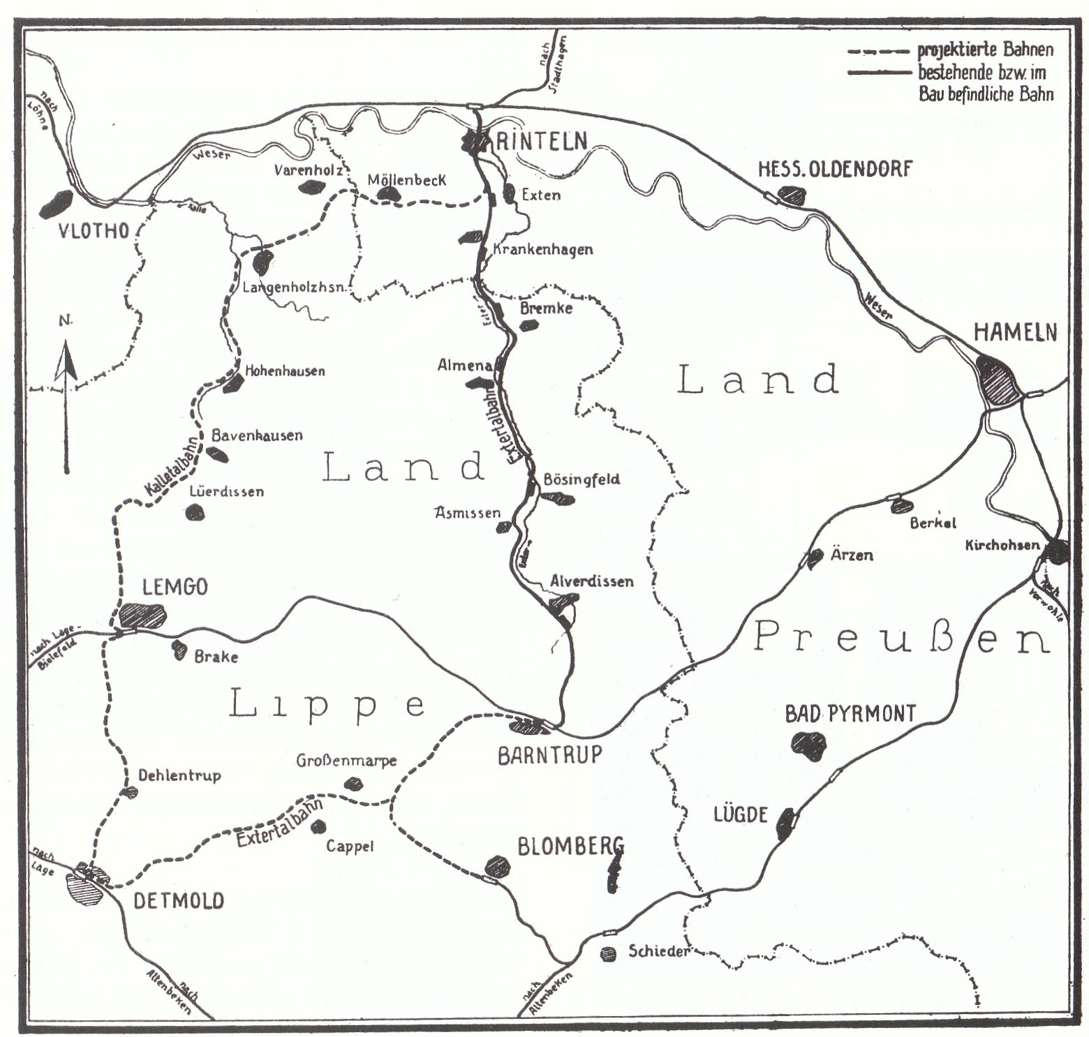 Entwurfsskizze für das Projekt einer Ringbahn durch Lippe